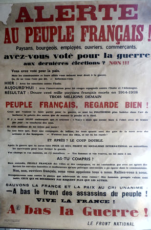 Affiche pacifiste du Front National, sans date (peut-être 1940)